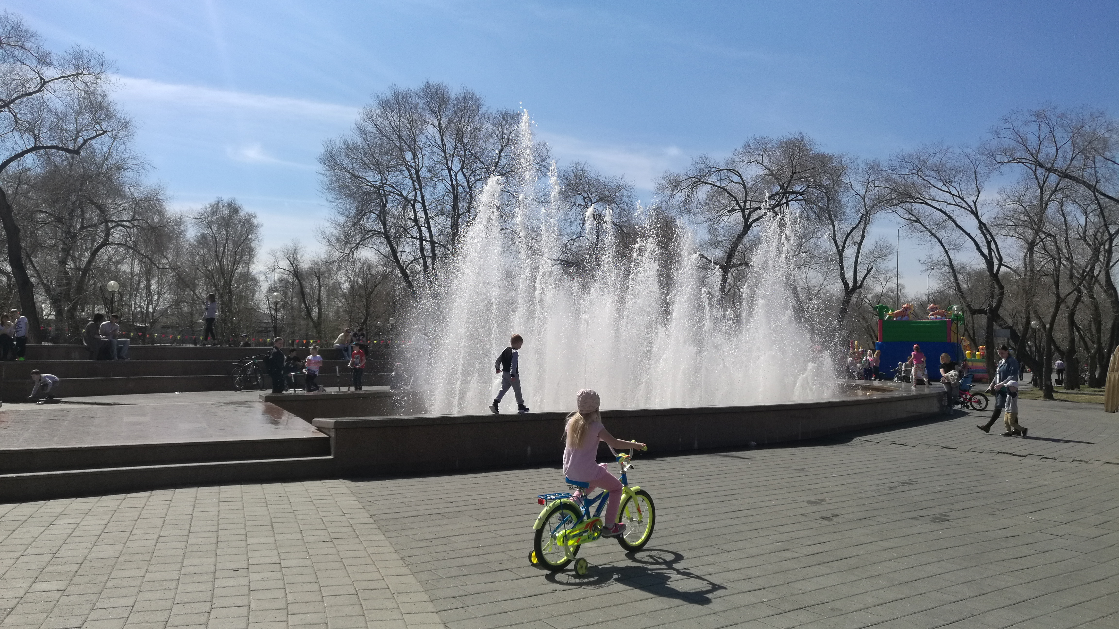 Komsomola parko. Tjumeno, Rusio.